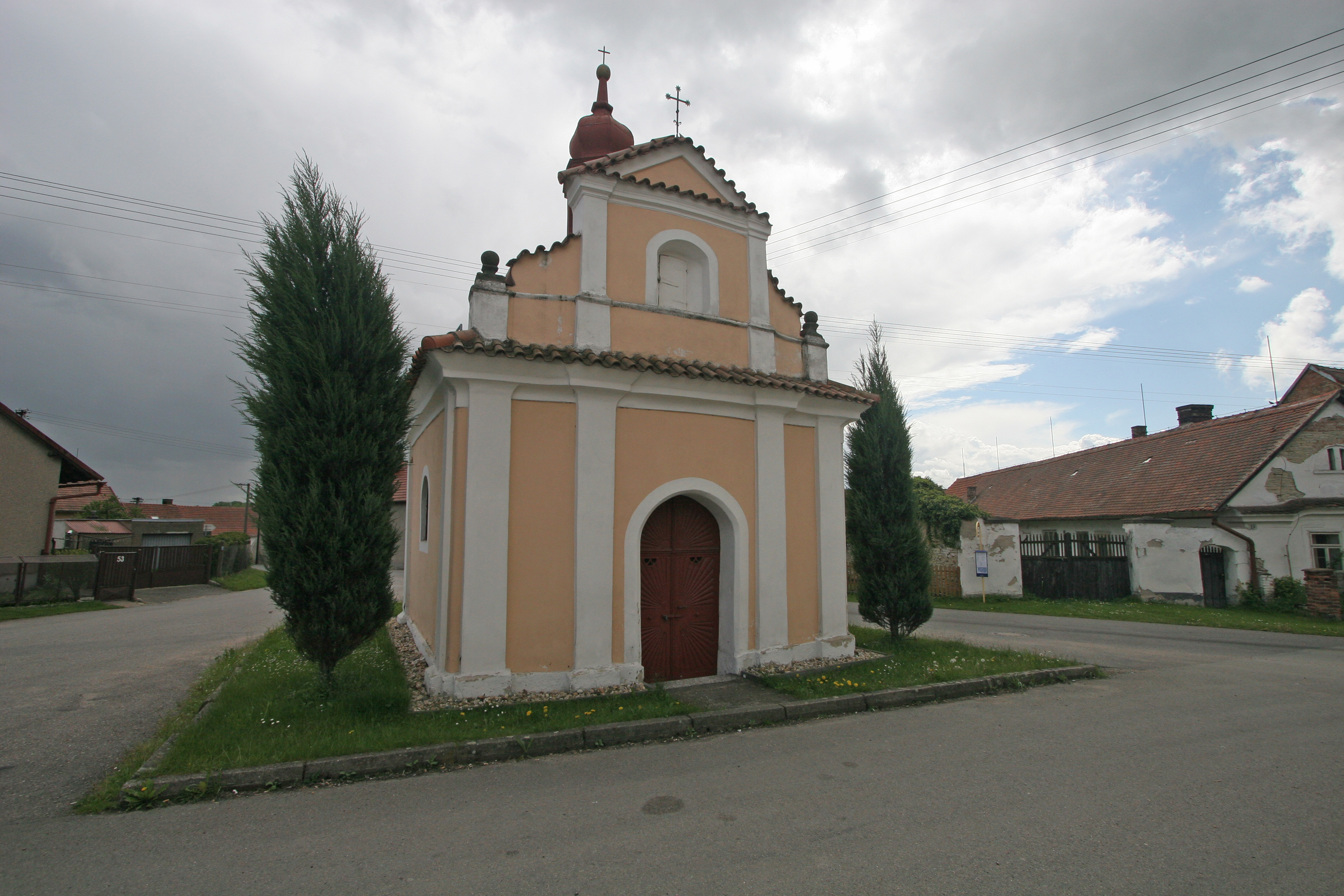 Čankovice kaple